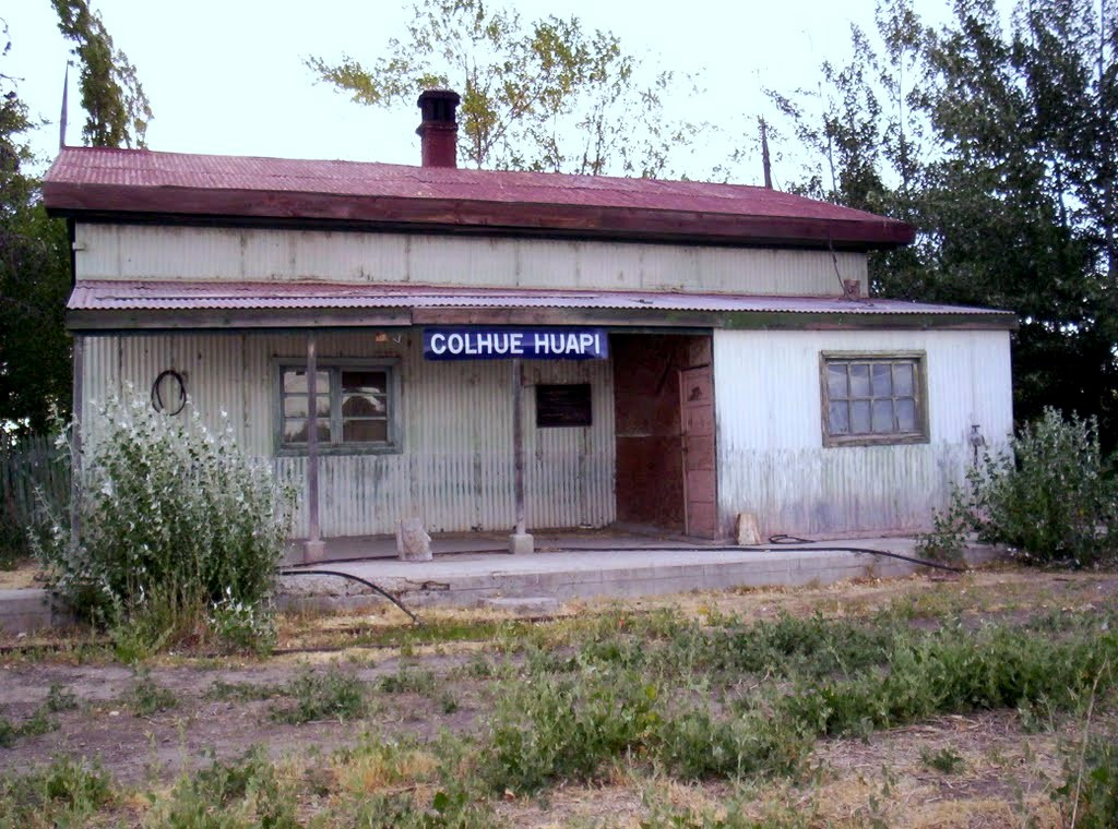 Ex estación Cohué Huapi en excelente estado de conservación